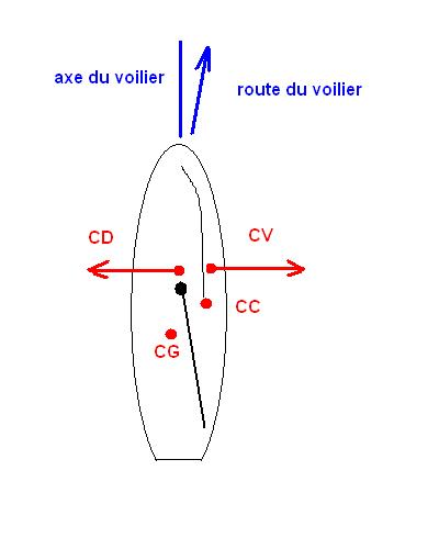 Schéma d'illustration de la position des différents centres d'un voilier par rapport à l'axe de lacet (vue de dessus)